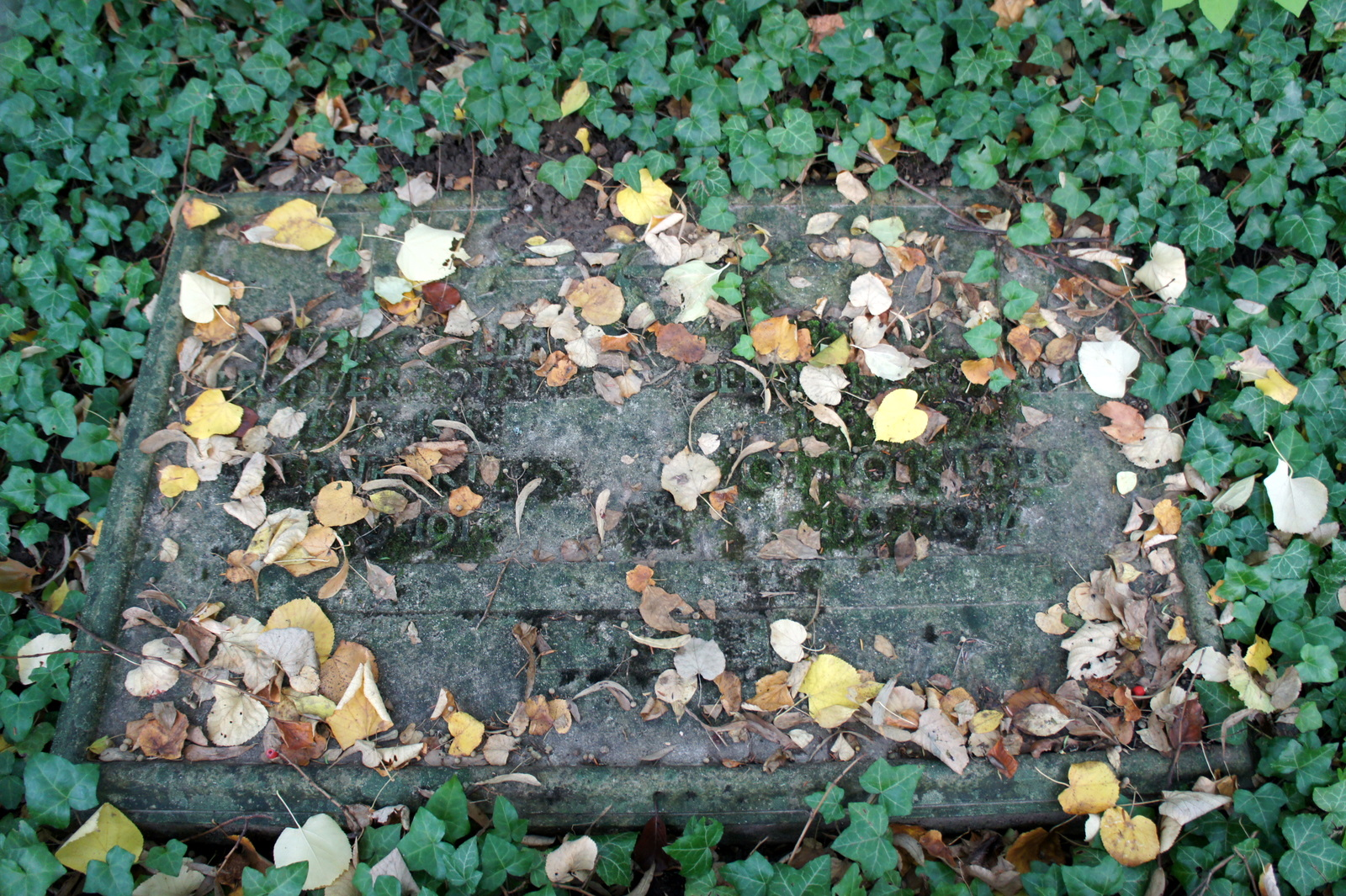 Klebs Grab in Heidelberg